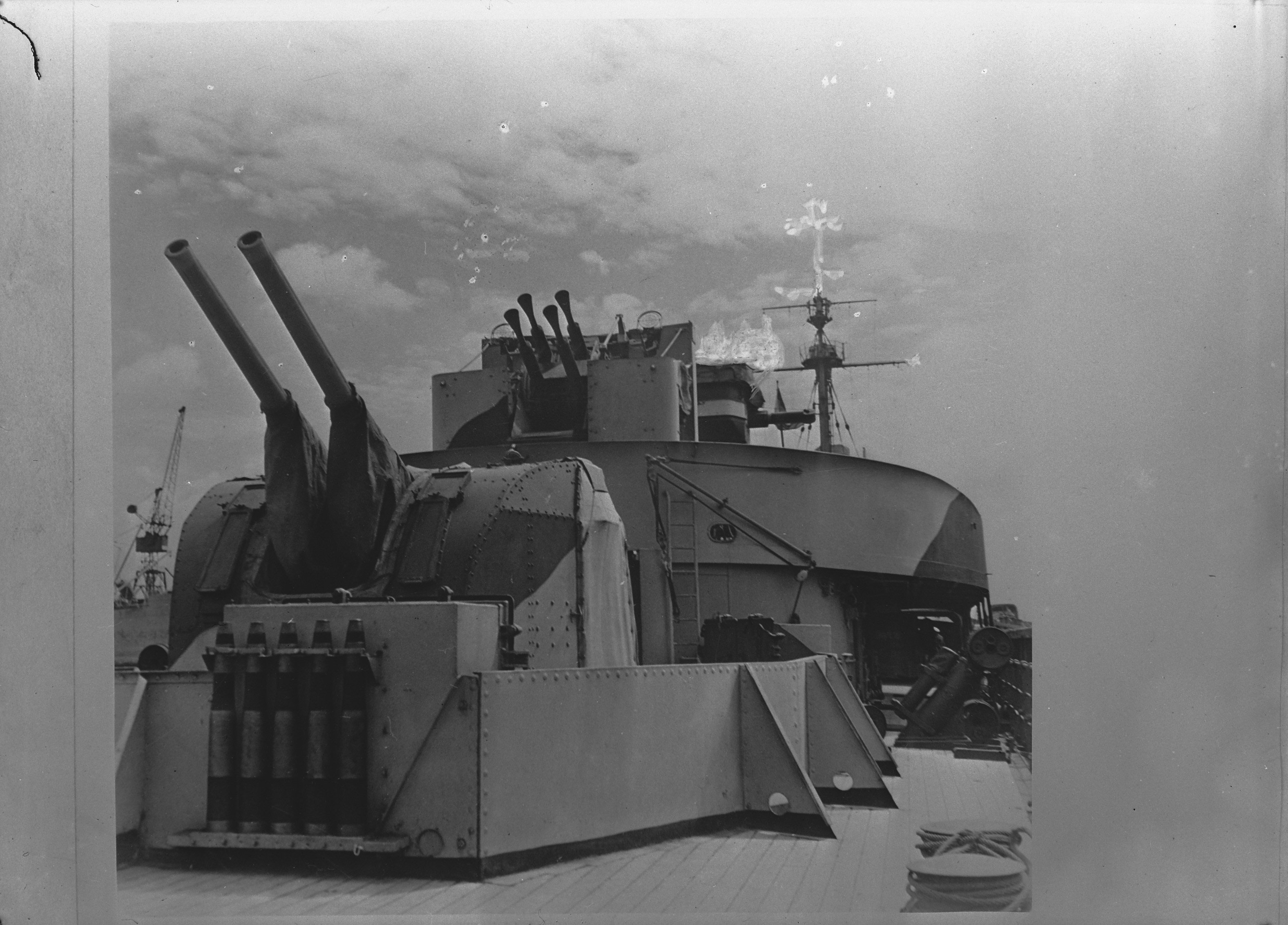 Collectie / Archief : Fotocollectie Anefo Reportage / Serie : NAVY [Navy] Anefo Londen serie Beschrijving : Hr. Ms. "Jacob van Heemskerck" terug in Groot-Brittannië na operaties in het Verre Oosten en de Middellandse Zee. Datum : juli 1944 Locatie : Groot-Brittannië Trefwoorden : marine, oorlogsschepen, tweede wereldoorlog Fotograaf : Onbekend / Publiek Domein Auteursrechthebbende : Nationaal Archief Materiaalsoort : Negatief (zwart/wit) Nummer archiefinventaris : bekijk toegang 2.24.01.04 Bestanddeelnummer : 935-0376